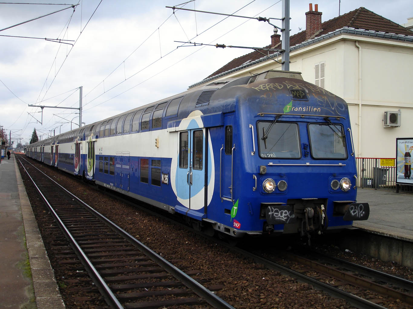 Rame VB 2N en gare de Franconville - Le Plessis-Bouchard (Val-d'Oise), France